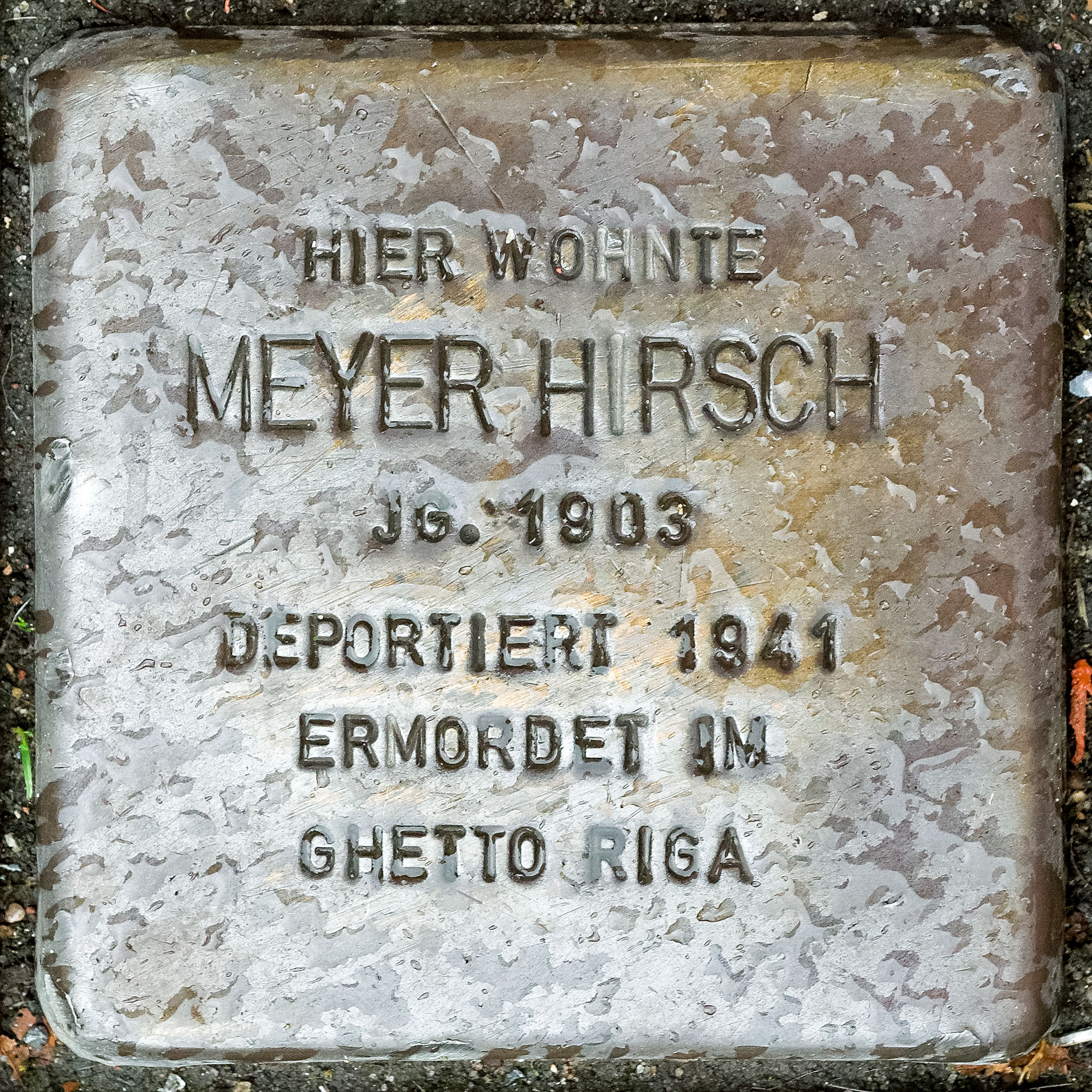 Stolpersteine in Viersen: Hirsch, Meyer